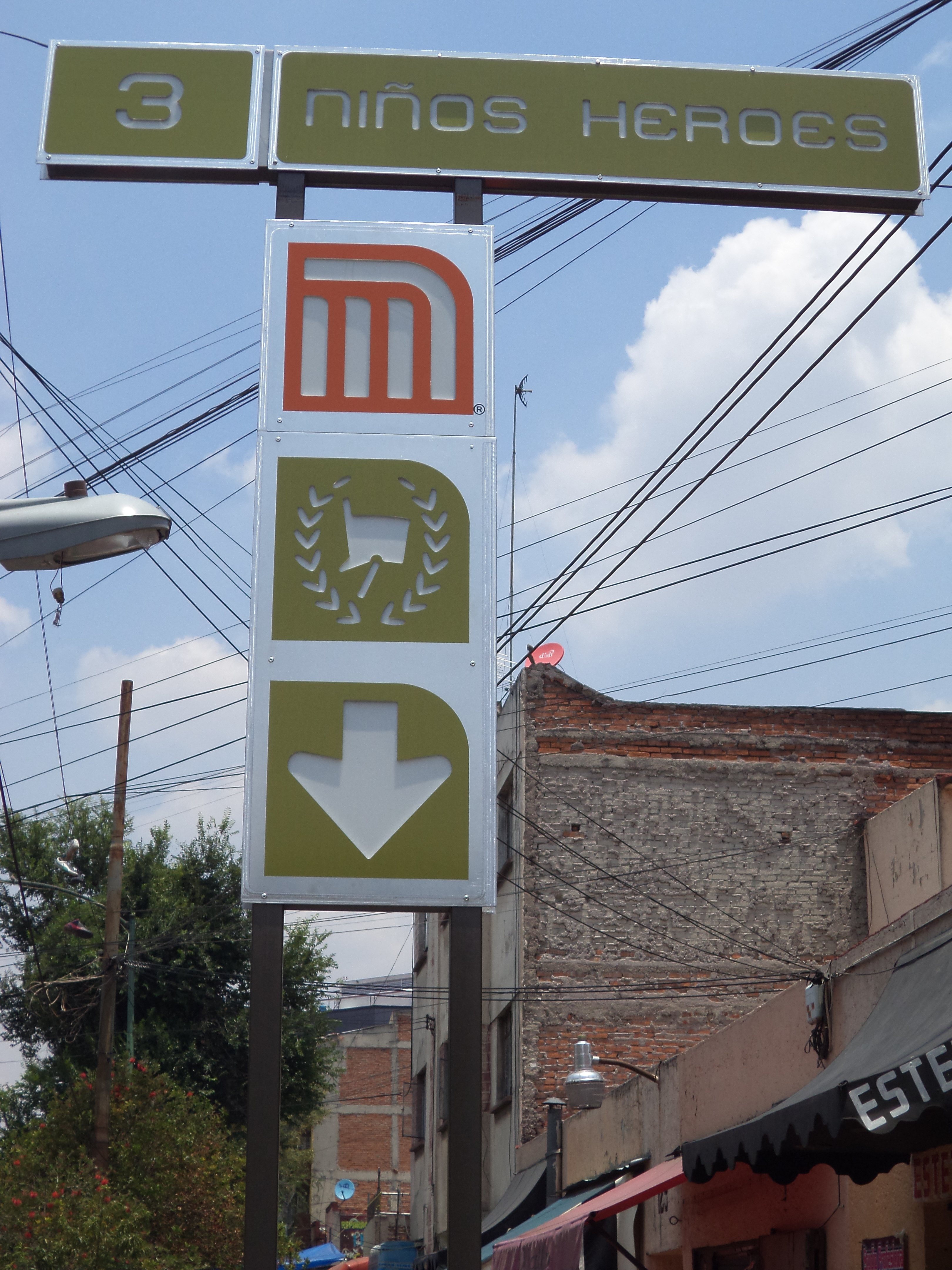 Niños Heroes